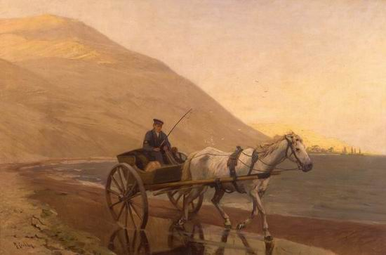 "Karriolspost"